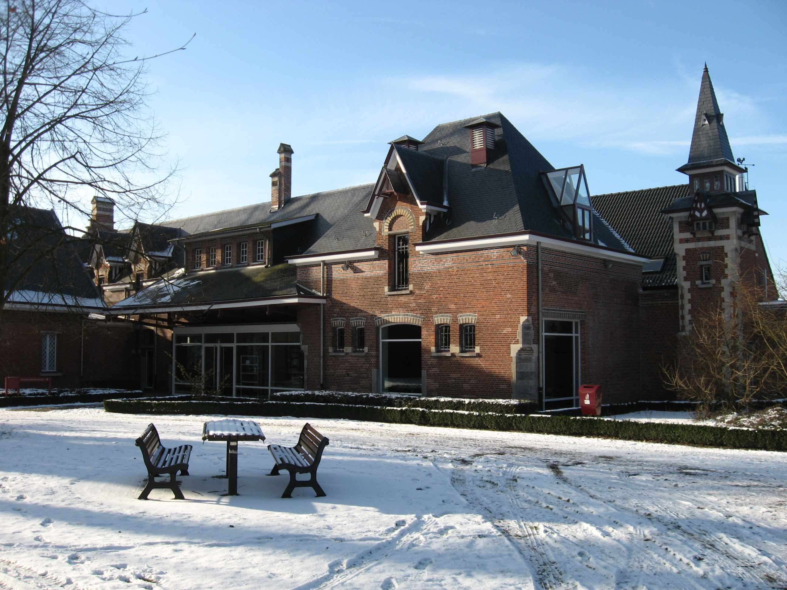 Gebouw in de "art nouveau" stijl in Brecht. Maakte deel uit van het buurtspoorweg complex. Wordt nu gebruikt voor de muziekacademie.